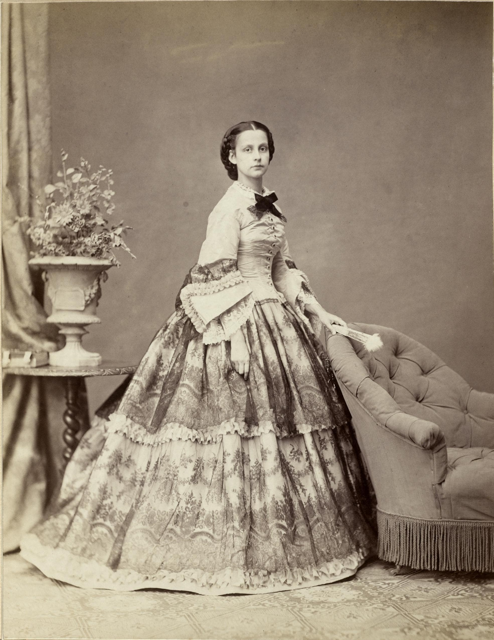 Bildnis der Maria Immakulata, Przn von Bourbon-Sizilien [184.... in jungen Jahren.